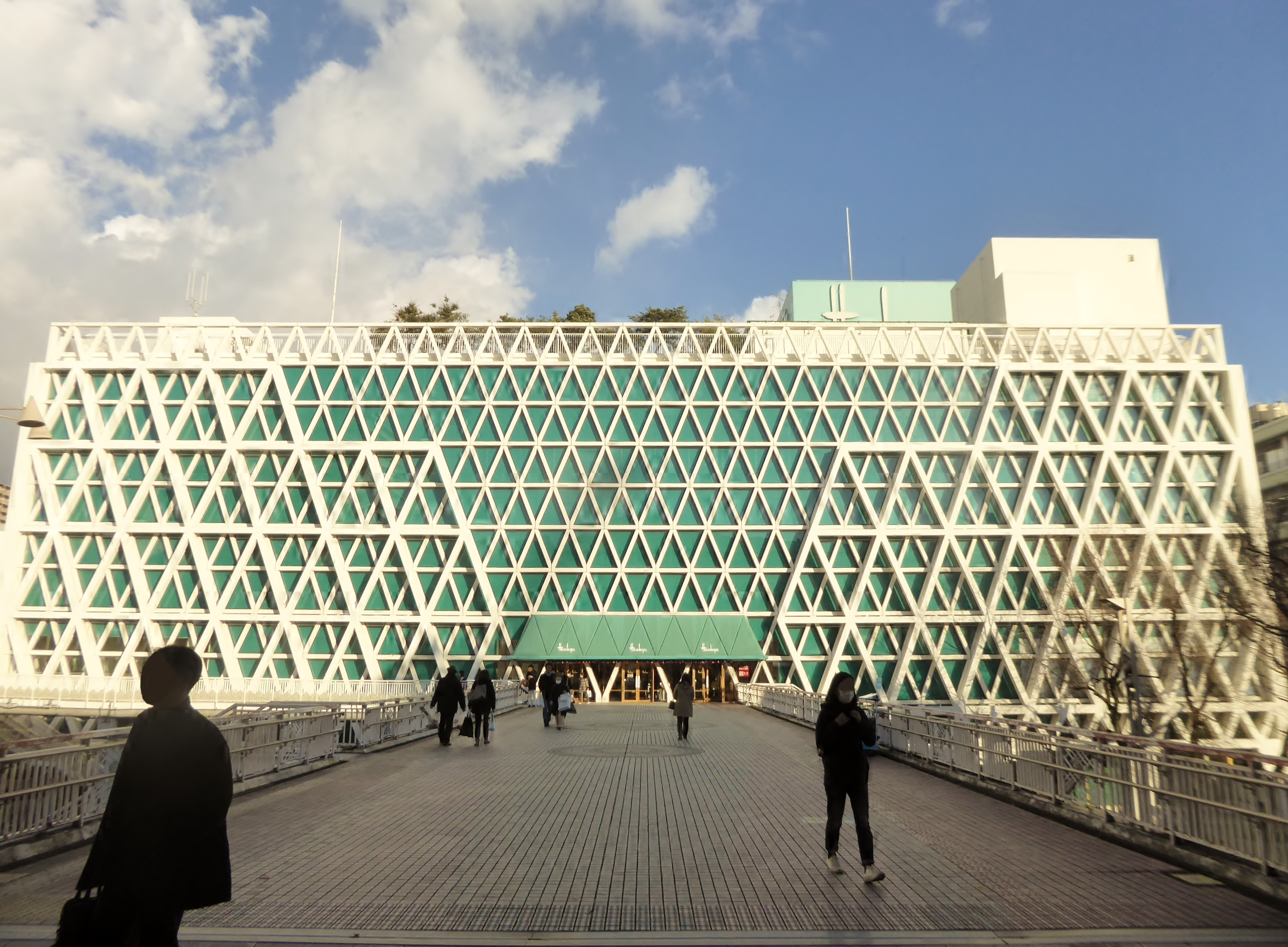 千里阪急を撮影。